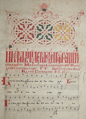 Супрасльскі ірмалой. 1601